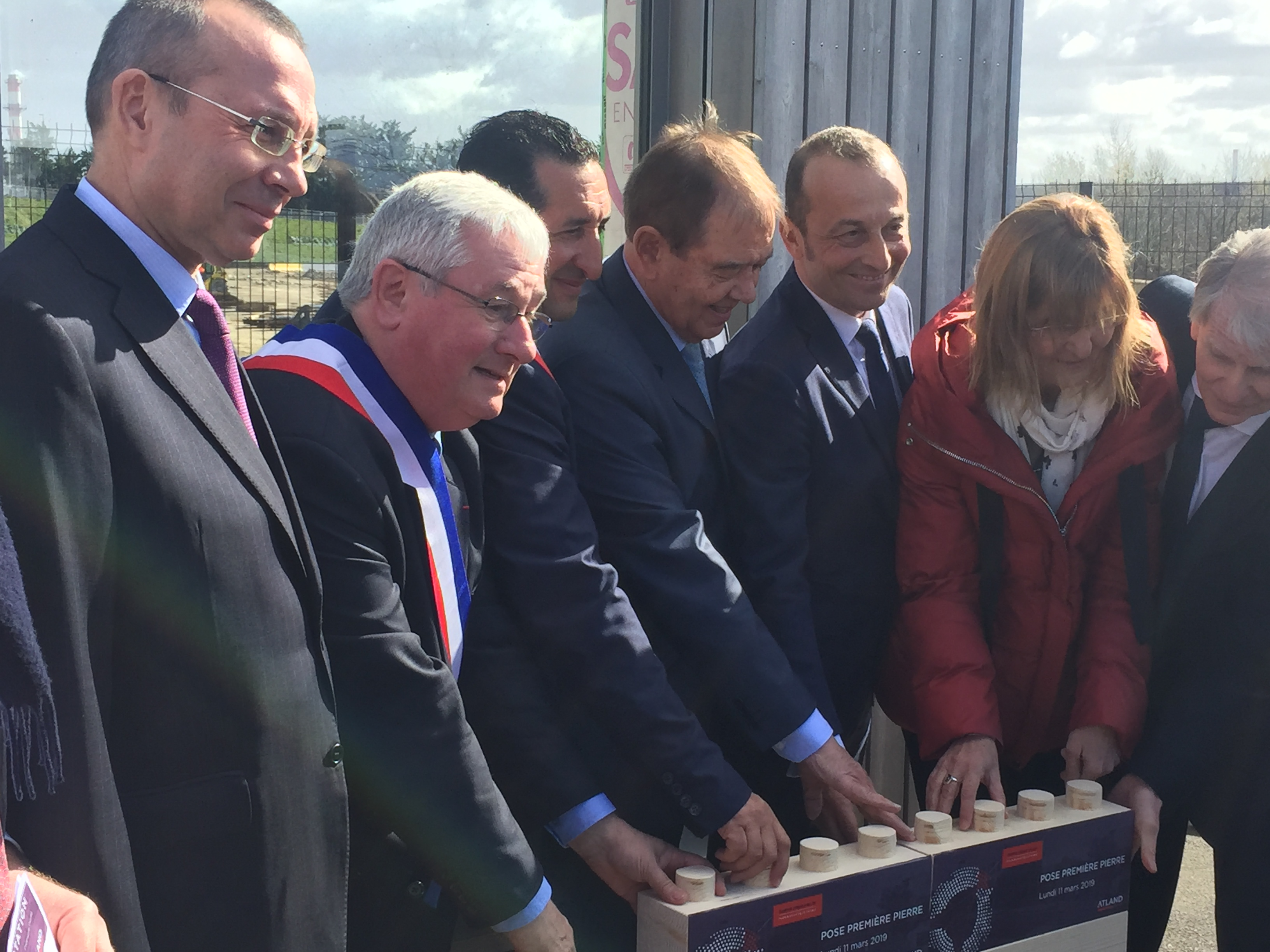 Pose de la première pierre du campus d'activité Atland sur le site de Pierrefitte - Stains le 11 mars 2019. Sur la photo, de gauche à droite, le préfet de la Seine-Saint-Denis Pierre-Yves Durand, le maire de Pierrefitte-sur-Seine Michel Fourcade, le maire de Stains Azzedine Taïbi, le président de la Métropole du Grand Paris Patrick Ollier, le président d'Atland Georges Rocchietta, la vice-présidente du Conseil départementale de la Seine-Saint-Denis Corinne Valls et le président de Plaine commune Patrick Braouezec.